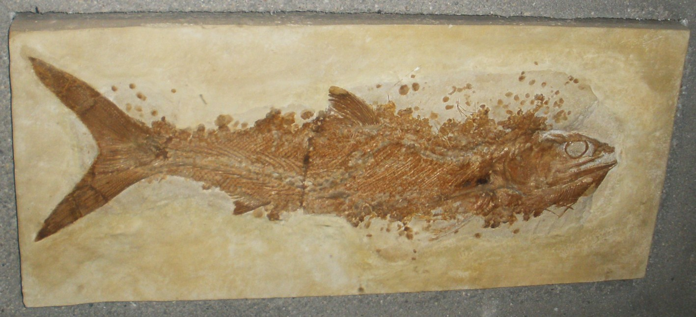 Fossil of Caturus, an extinct fish- Took the photo at Senckenberg Museum of Frankfurt